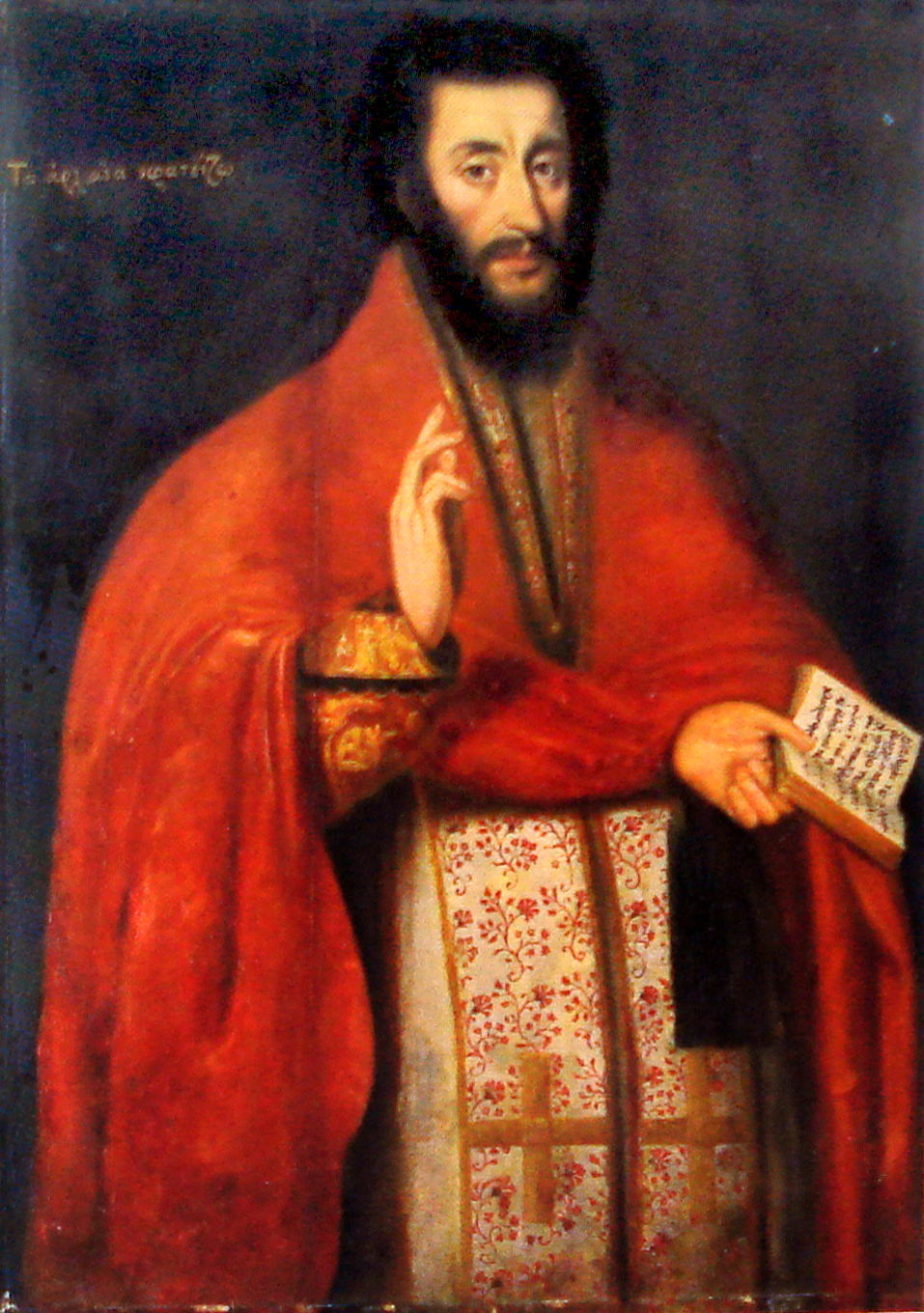 Greek priest